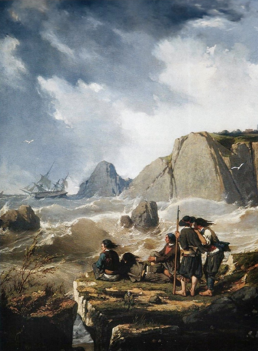 Pierre-Émile Barthélémy ( né à Rouen en 1818, décédé en 1890 à Bernières-sur-Mer) : Naufrage sur la côte bretonne (1851, musée de Morlaix)